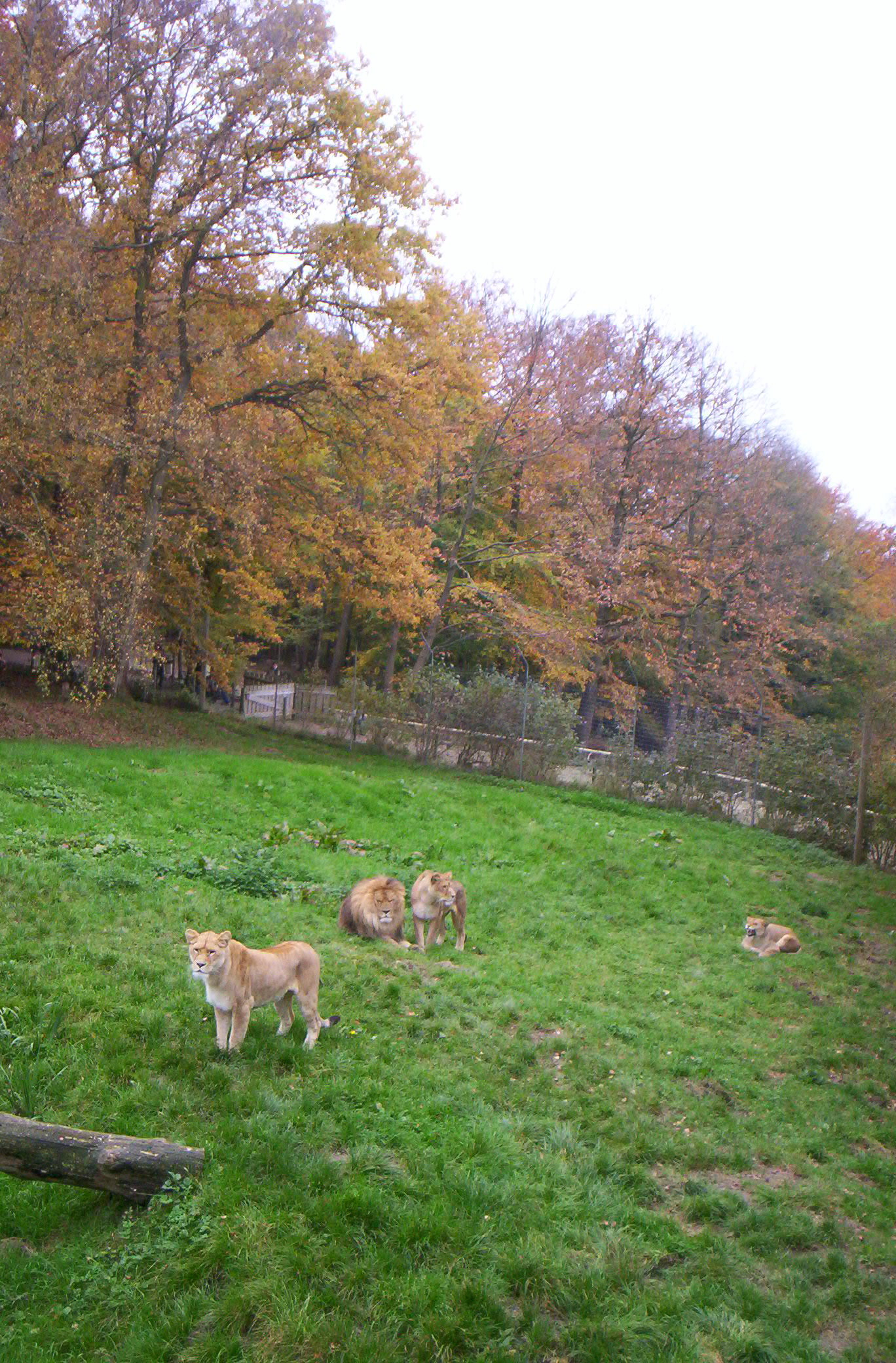 Lions au parc zoologique de Lisieux